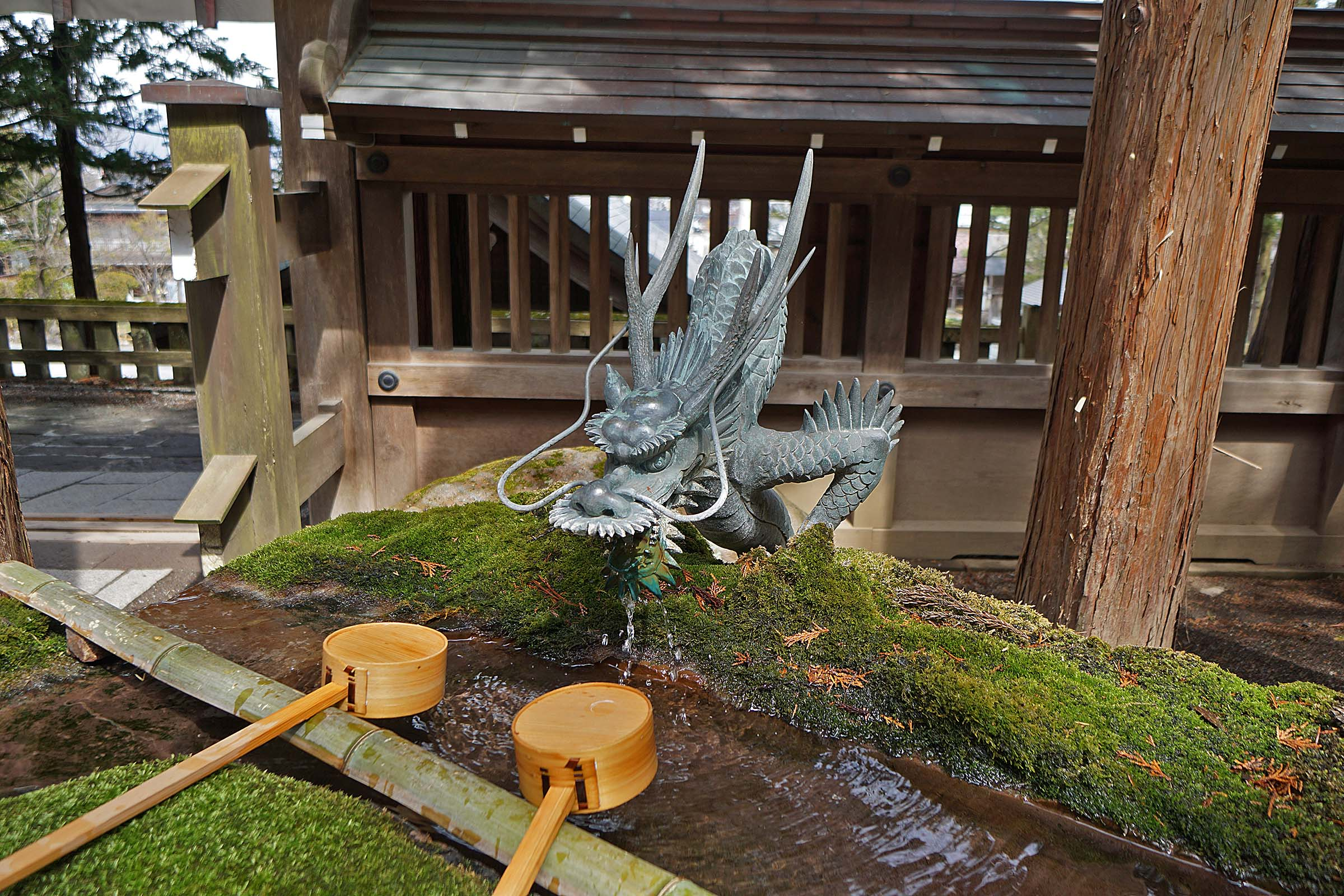 Suwa taisha Kamisha Honmiya , 諏訪大社 上社 本宮